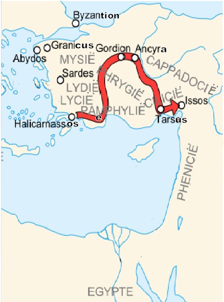 De tocht van Alexander de Grote van Halicarnassos tot Issos